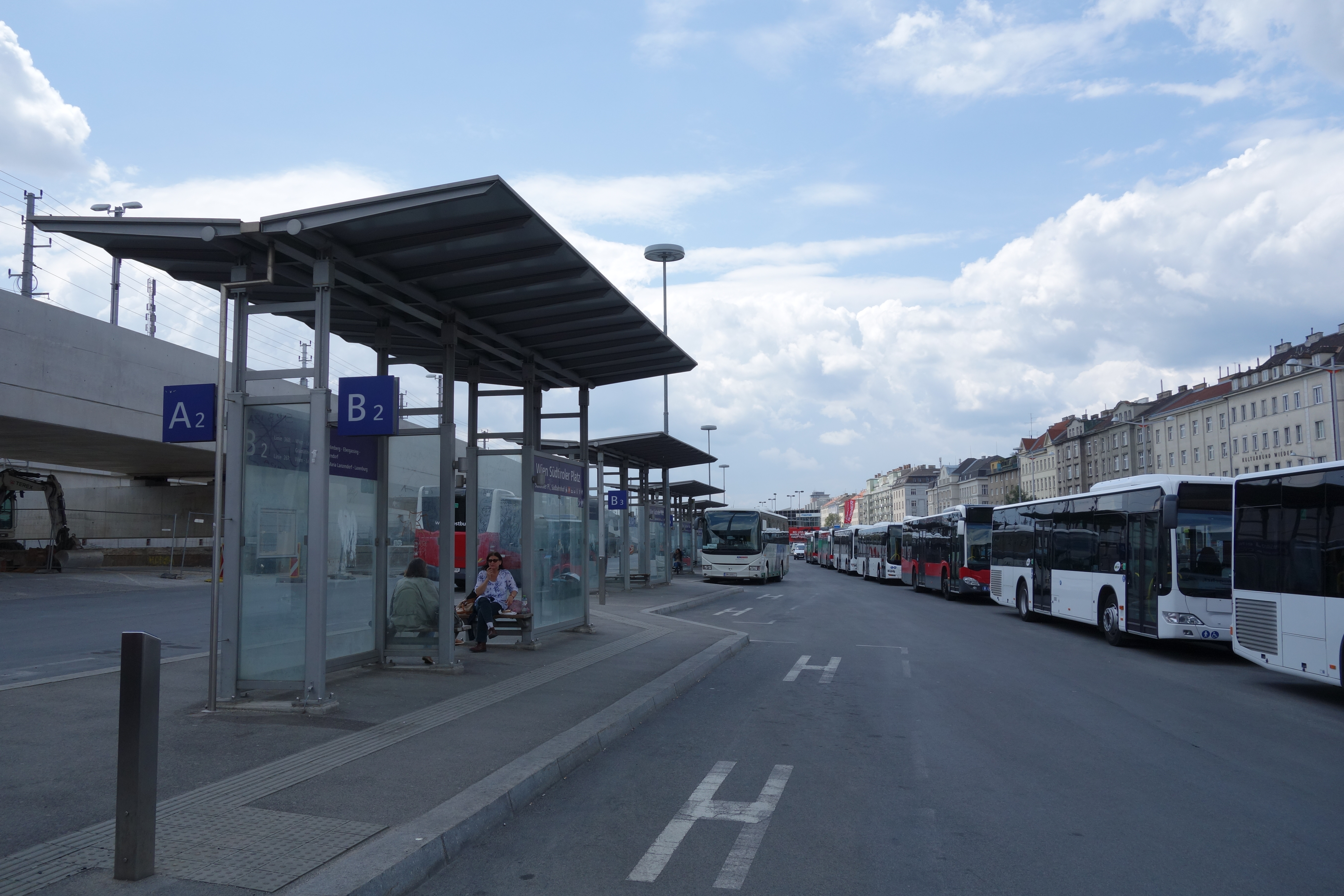 Der Busbahnhof am Südtiroler Platz im Juni 2014.